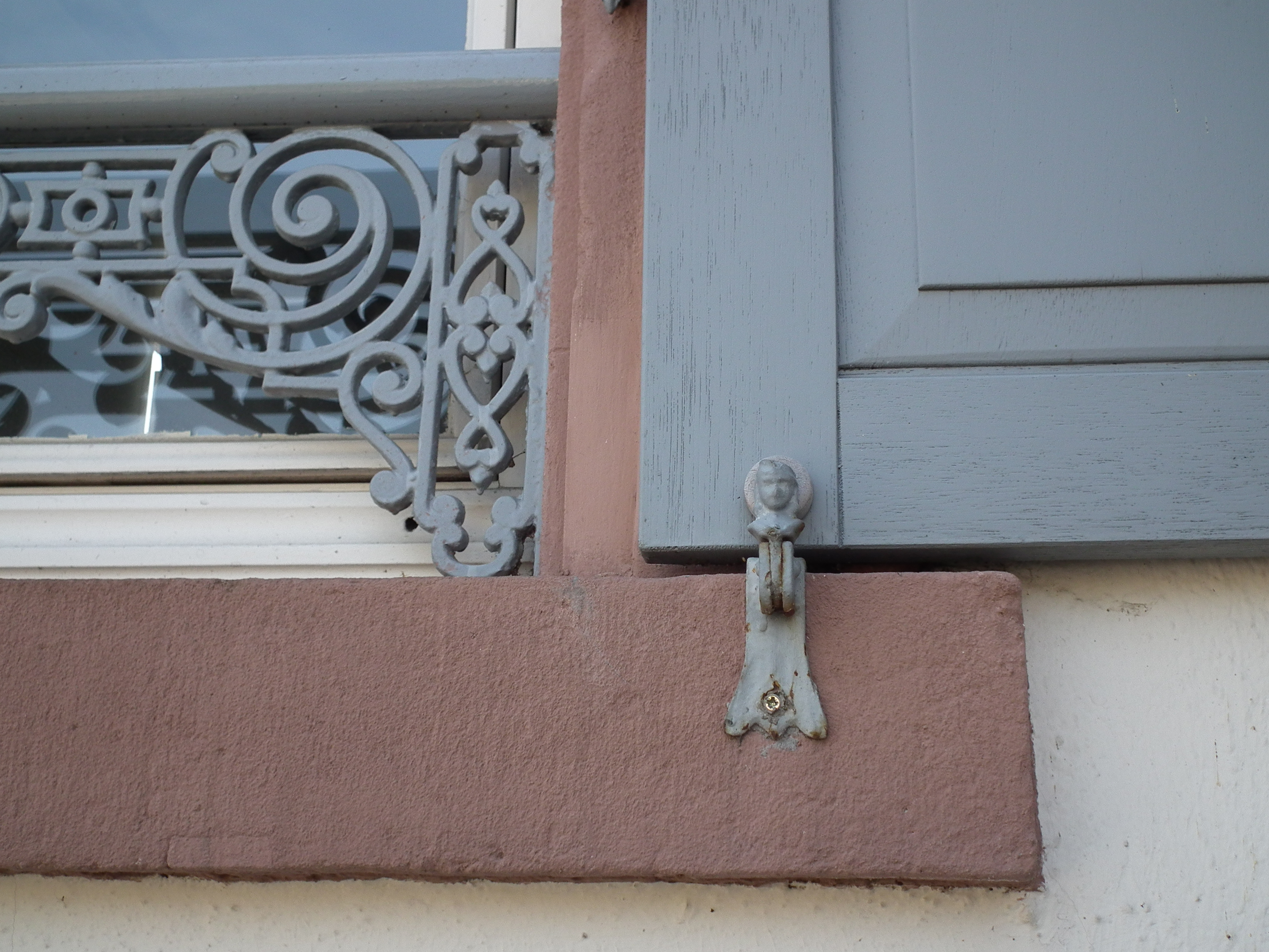 Arretierung eines Holzfensterladens am Wohnhaus von Carl Benz in Ladenburg (Baden-Württemberg, Deutschland)